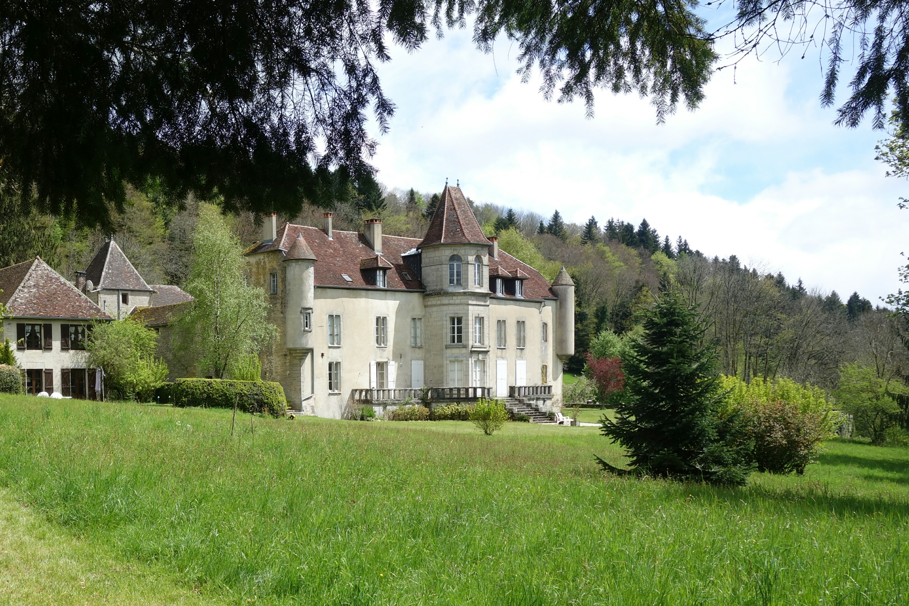 Le château de Mérona (Jura) et son parc